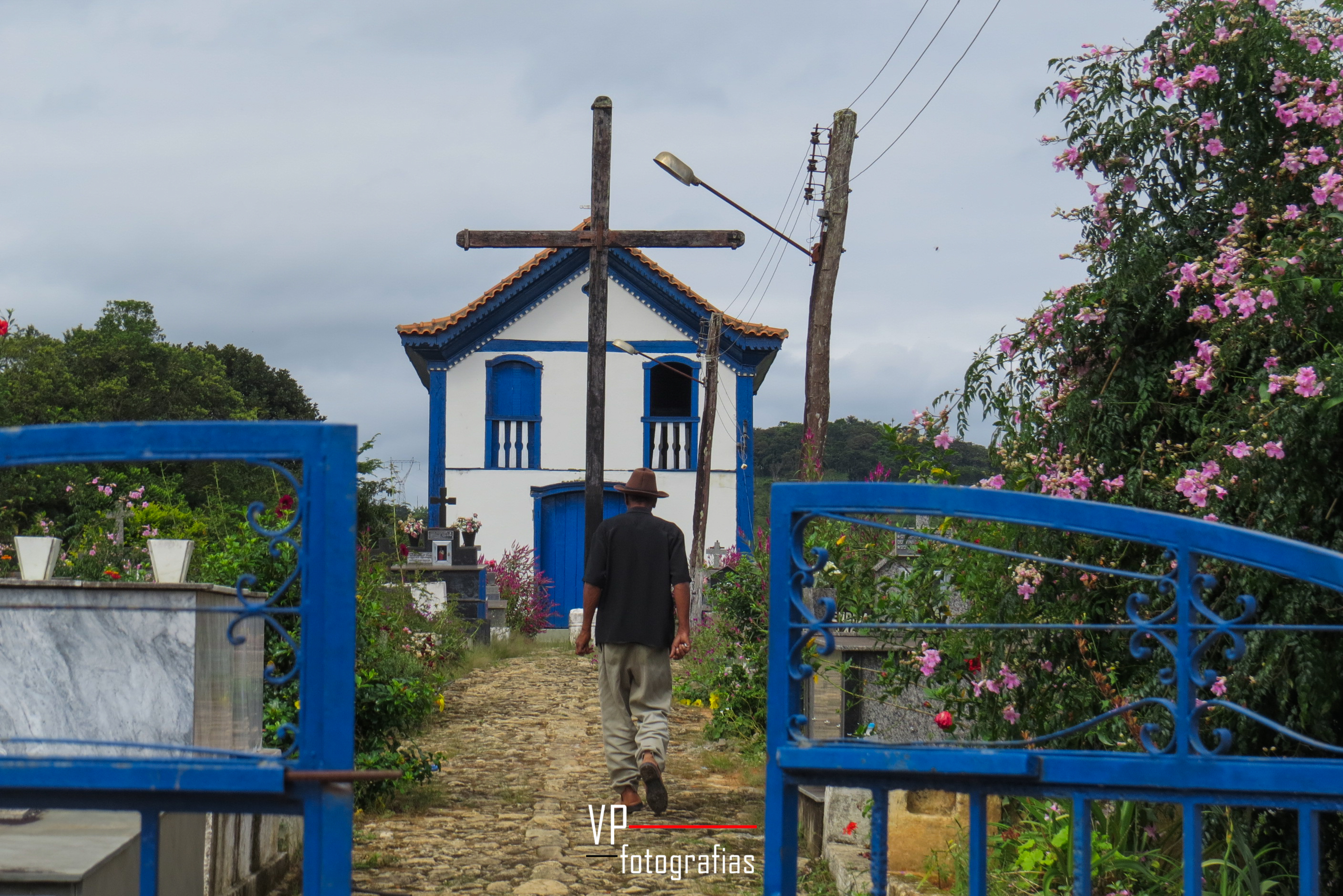 Bom Jesus do Amparo, MG, Brazil